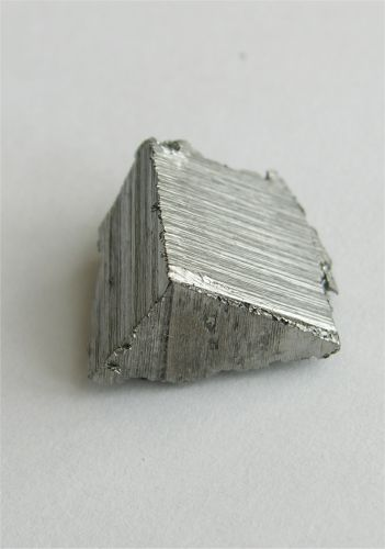 Erbium